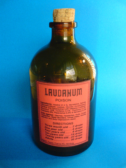 Laudanum (Opiumtinktur) 100ml Medizinflasche. (Replikat nach original Vorbild)